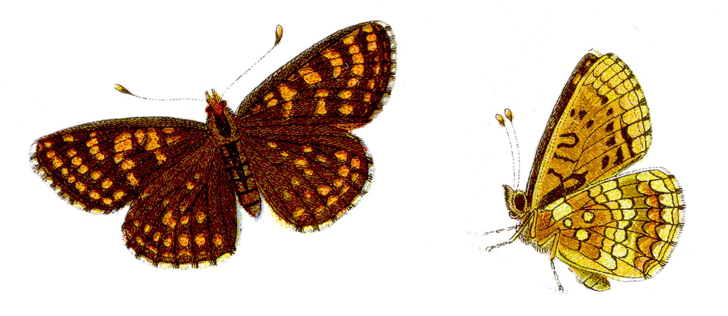 Ehrenpreis-Scheckenfalter - Melitaea aurelia